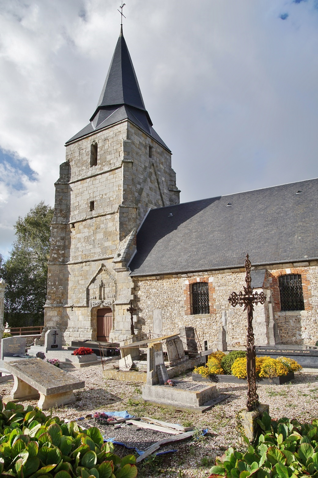 Église Saint-Rémi et Saint-Lubin de Criquetot-le-Mauconduit (76).